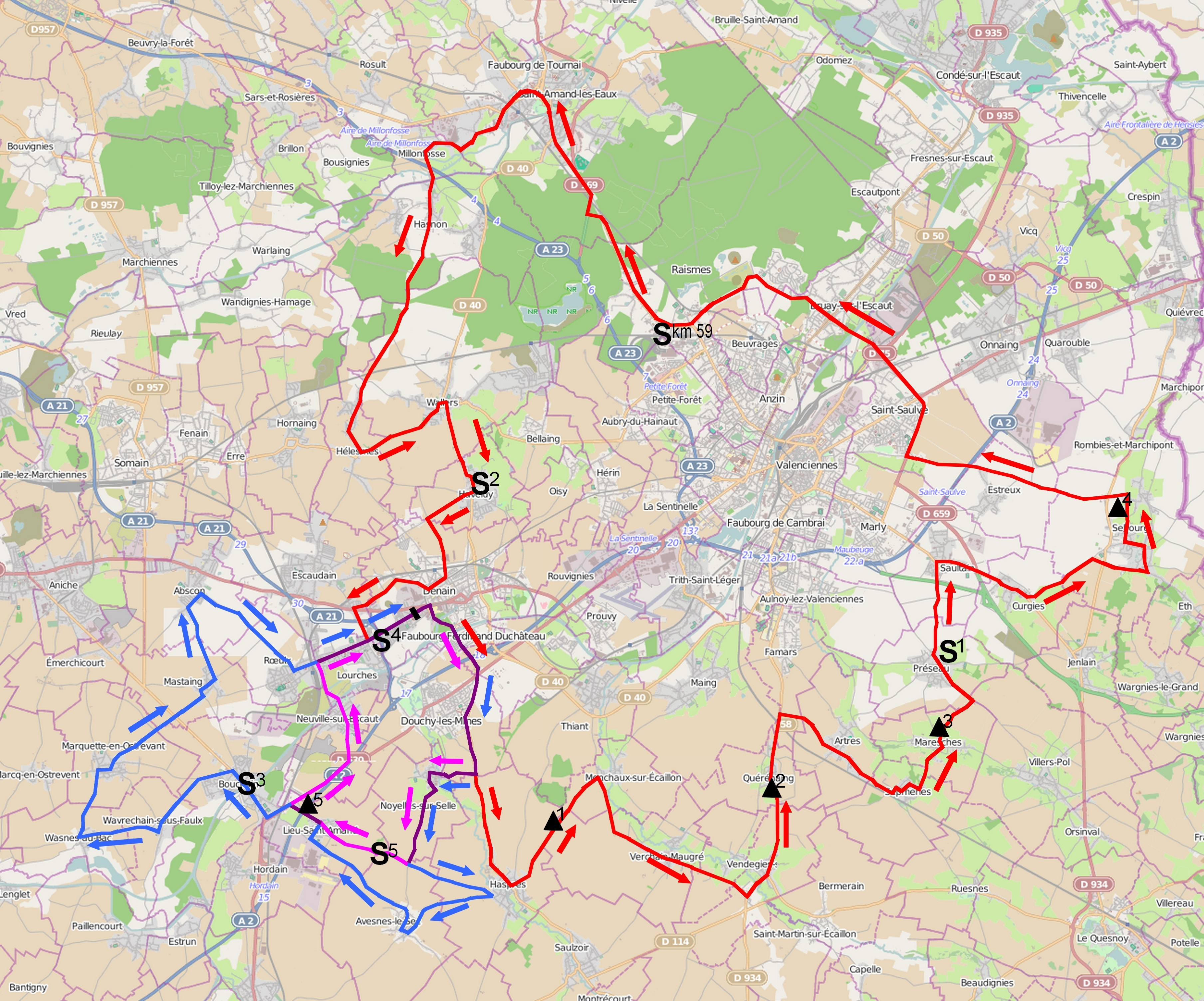 Reportage réalisé le jeudi 17 avril à l'occasion du départ et de l'arrivée du Grand Prix de Denain 2014 à Denain, Nord, Nord-Pas-de-Calais, France.